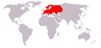 Bewerking afbeelding: Afbeelding_(kaart).JPG